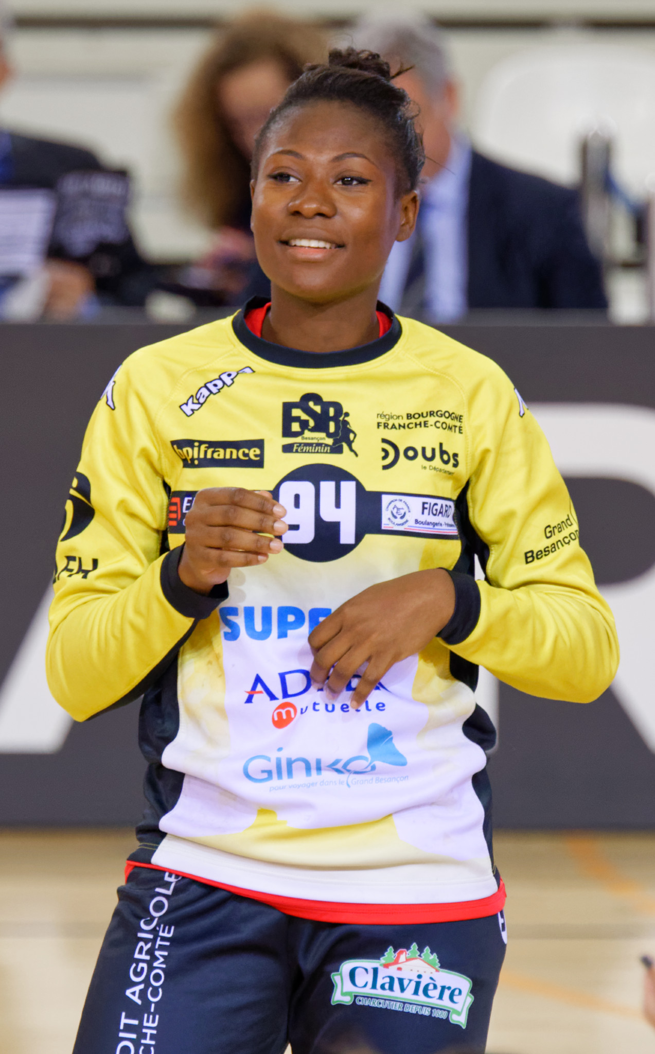 Rencontre de championnat entre Issy Paris Hand et ES Besançon. A Issy Les Moulineaux, le 26 octobre 2016.